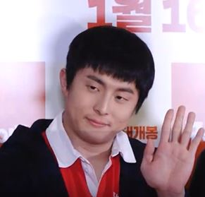 1월 2일 오후 서울시 광진구 자양동 롯데시네마 건대입구에서 영화 ‘구스 베이비’ VIP시사회가 열렸다.